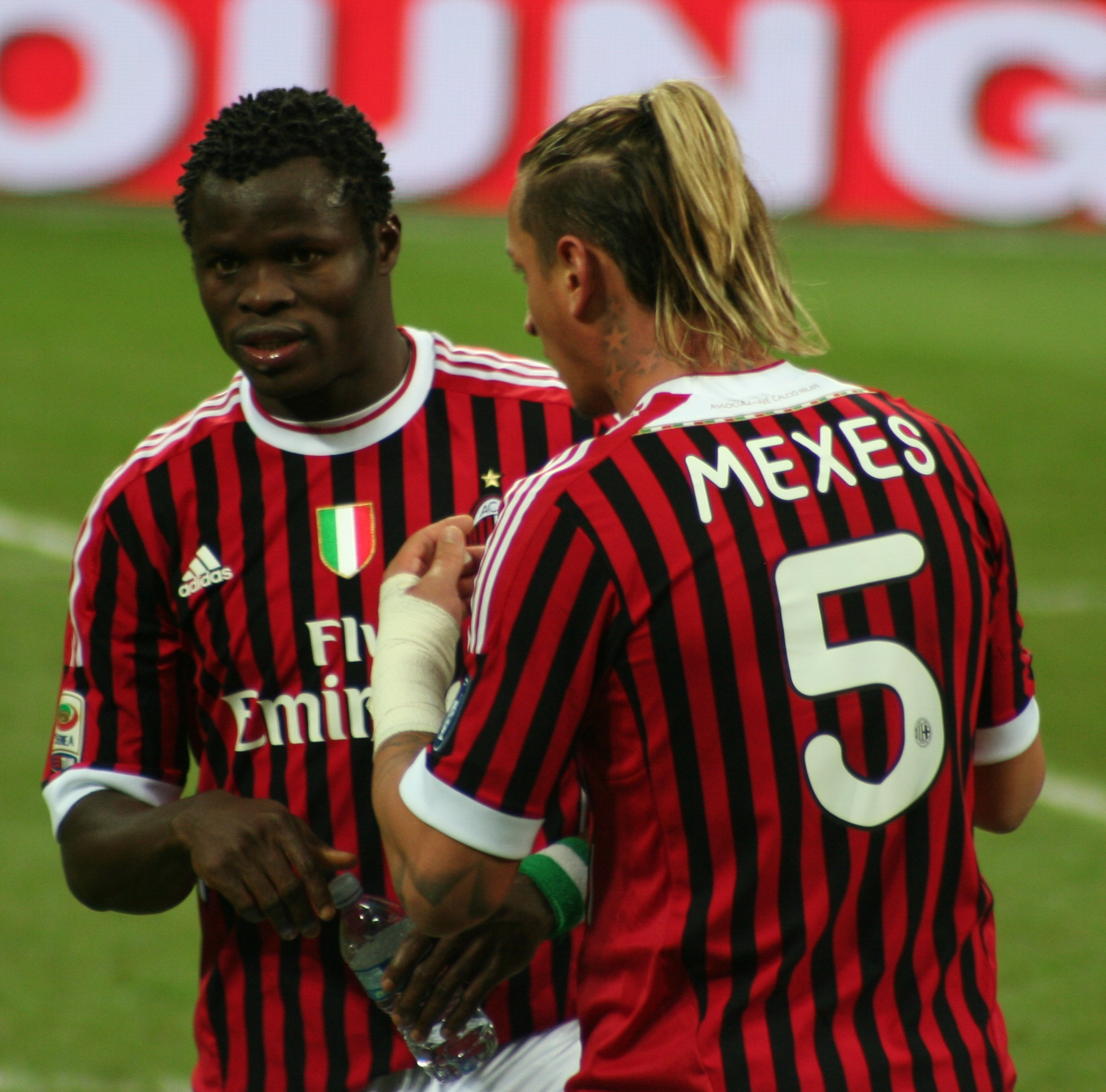 Mexes. Partita Milan-Siena stagione 2011-2012